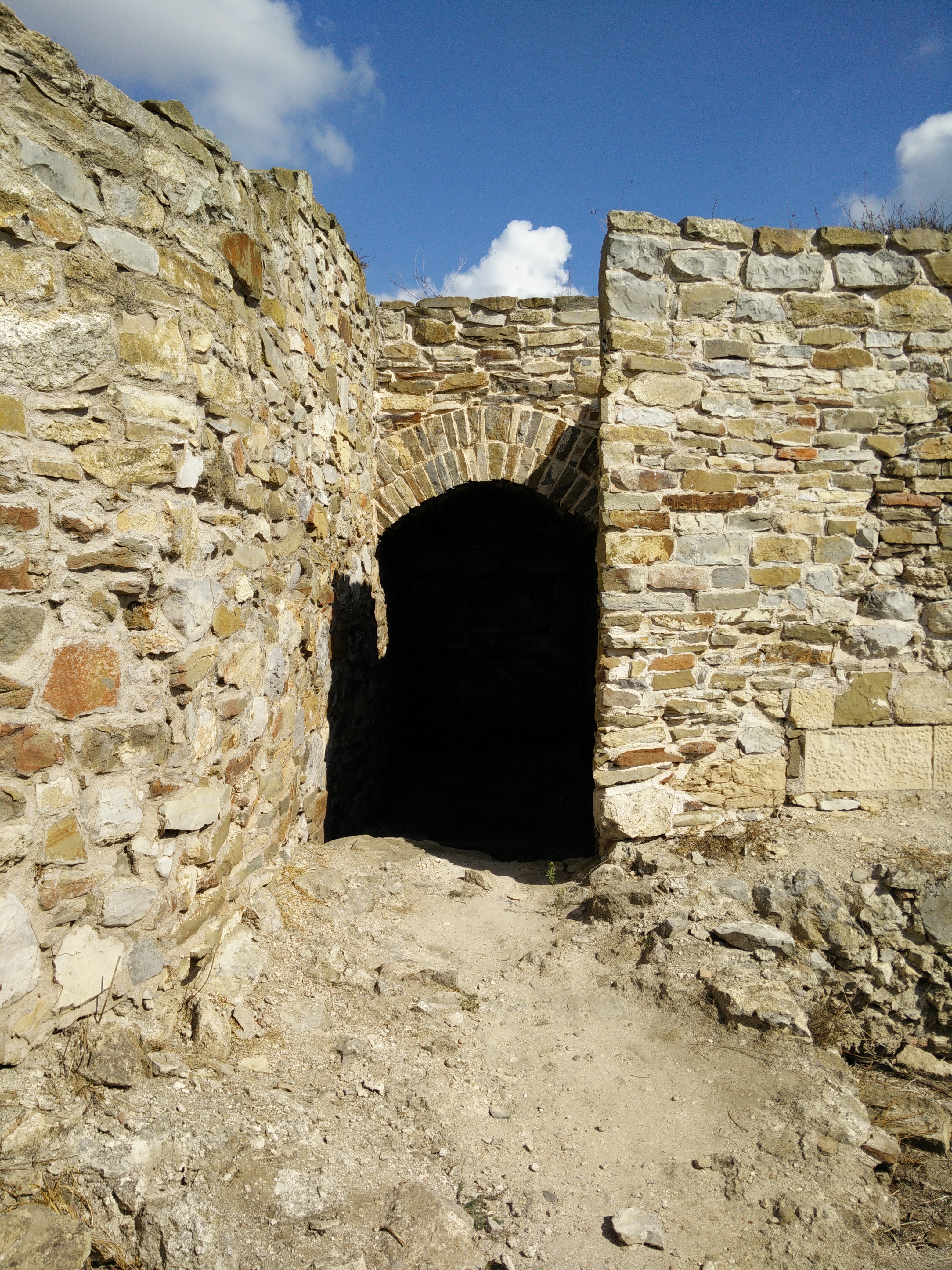 Cetatea Halmyris 01